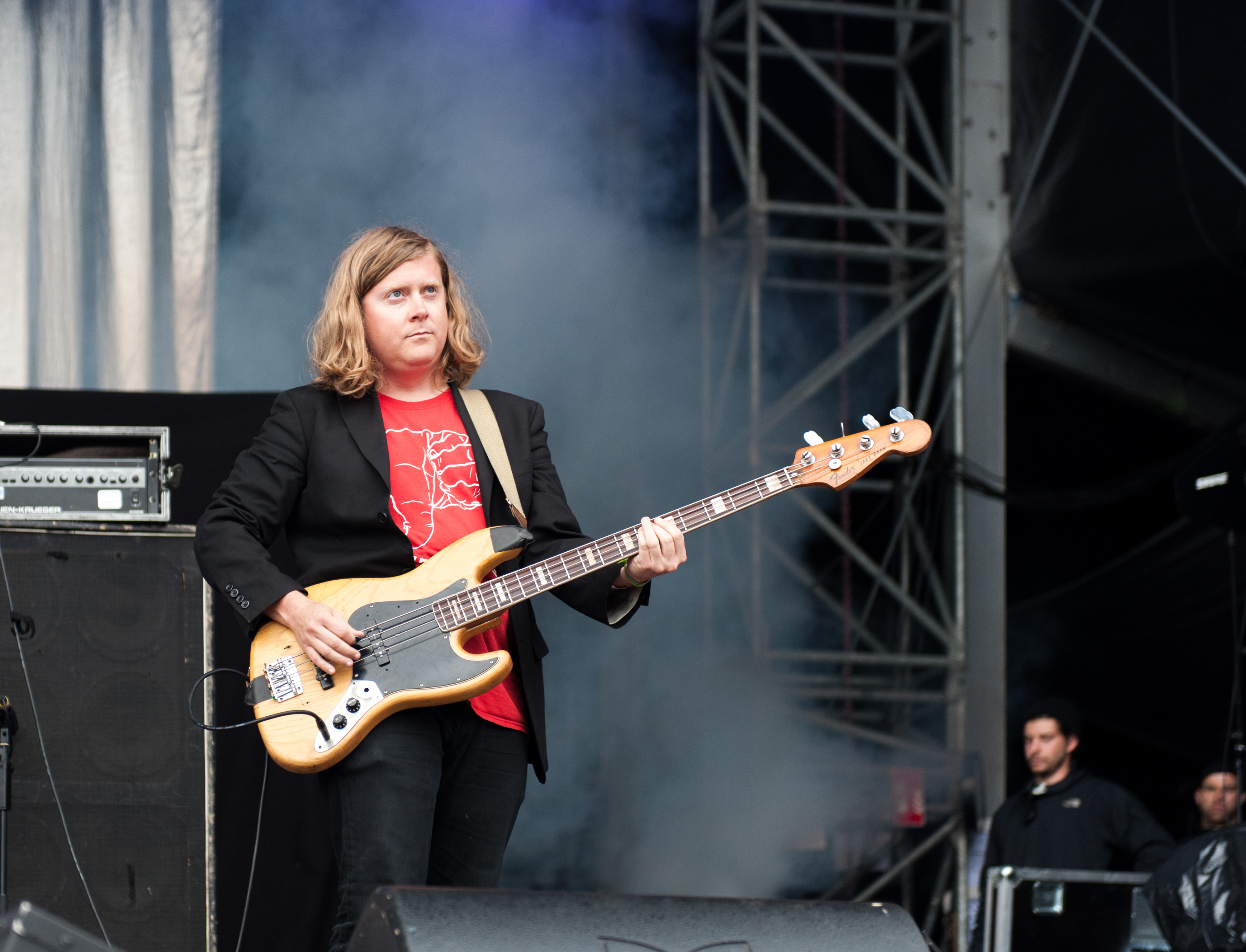 Die Band Future Islands auf dem Kosmonaut Festival 2015 in Chemnitz Oberrabenstein.